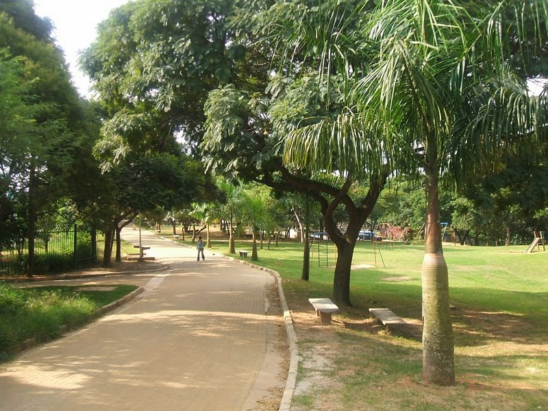 Parque Raposo Tavares, no distrito homônimo da cidade de São Paulo, Brasil.